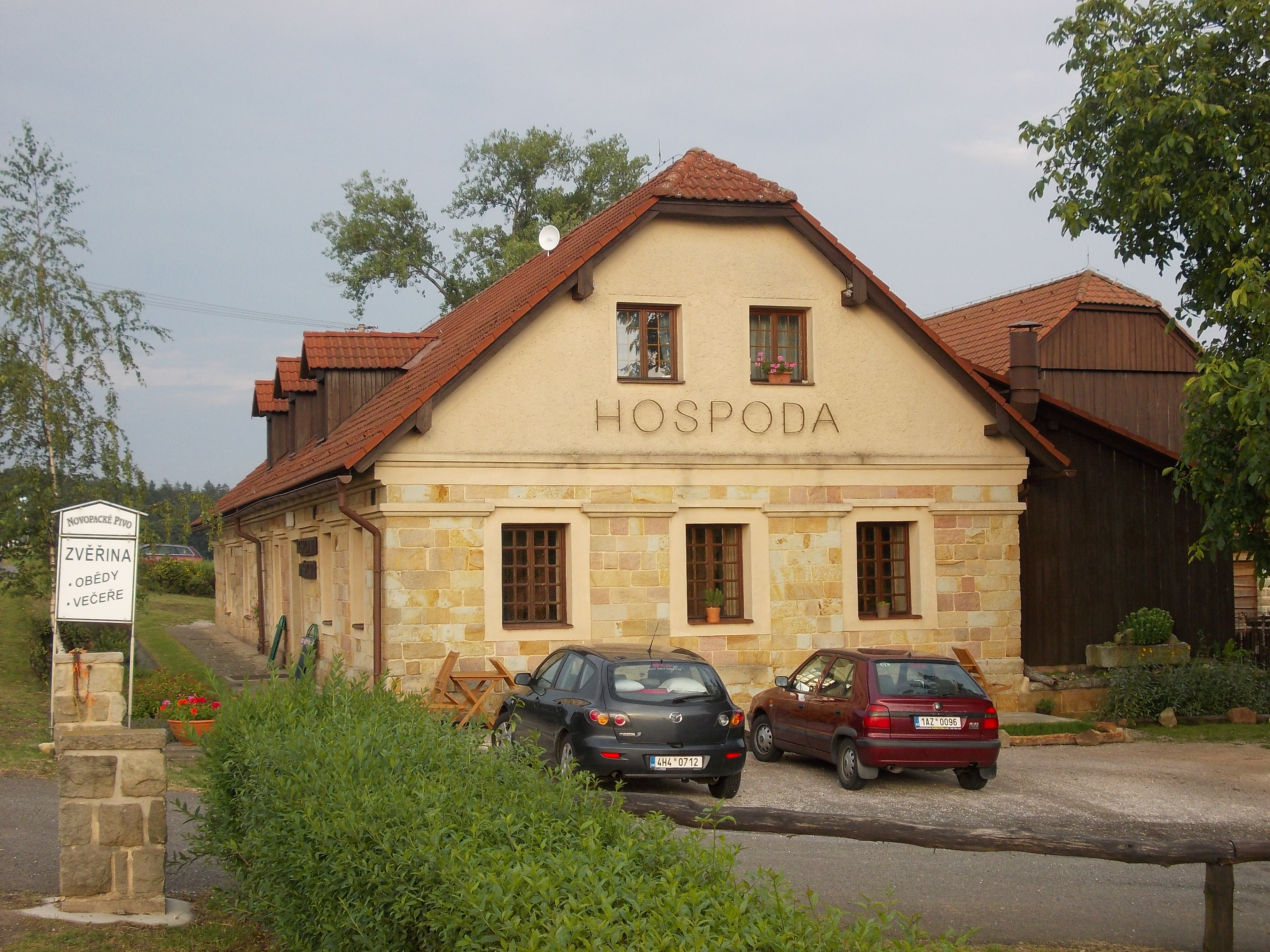 Dřevěnice - Hospoda Na Špici (č.p. 52)